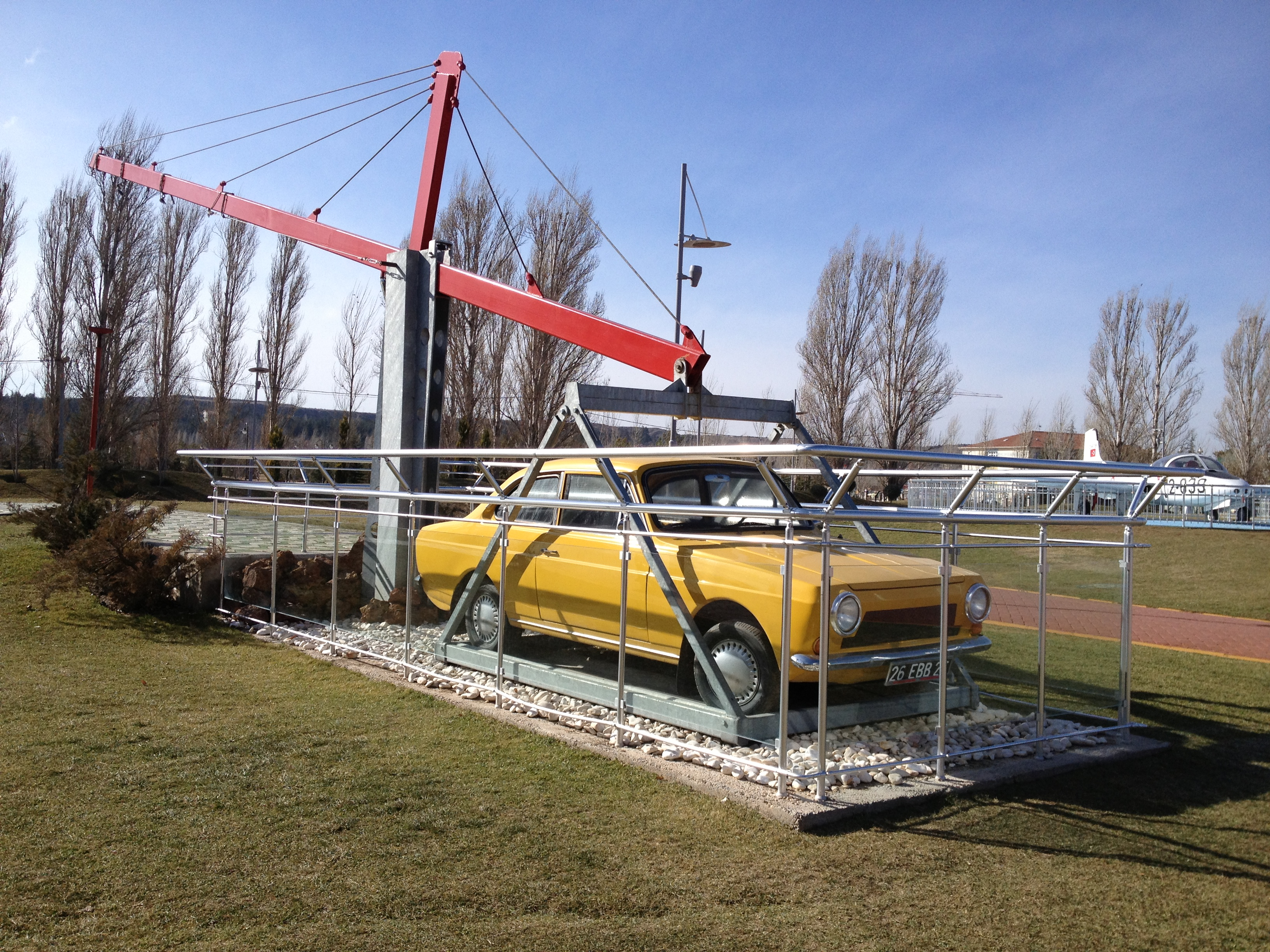 Eskişehir Bilim Deney Merkezi bahçesindeki Anadol marka otomobilin kaldırma testi yapıldığı alan